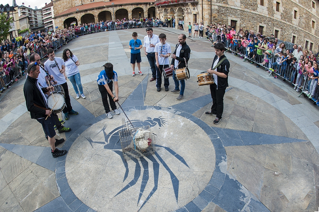 Ehiztaria oilarra duen kaiolara iristen, 2016ko Legazpiko oilar jokoan.